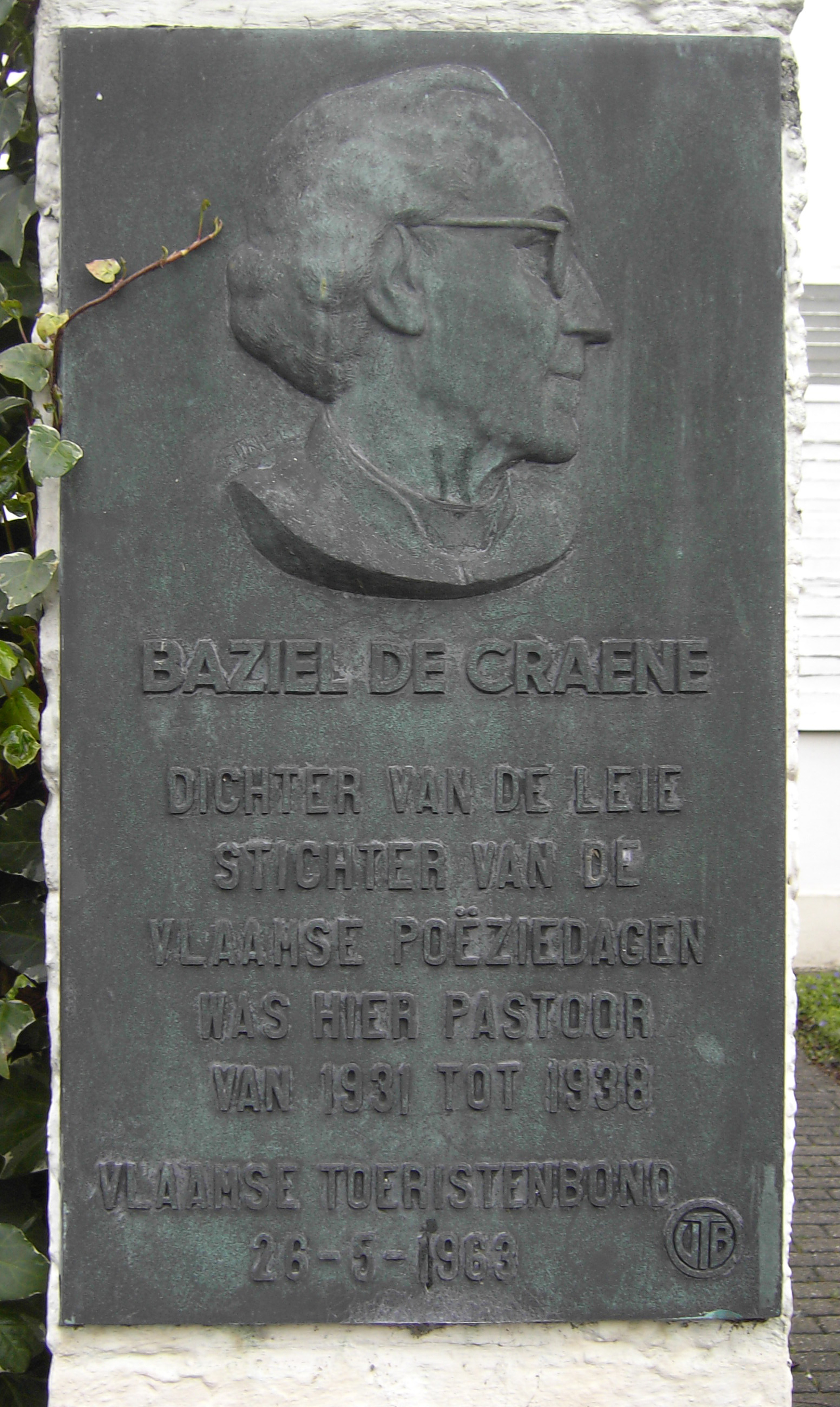 De Craene Baziel - Priester dichter - Belgium